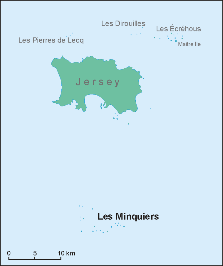 Location map of Les Minquiers